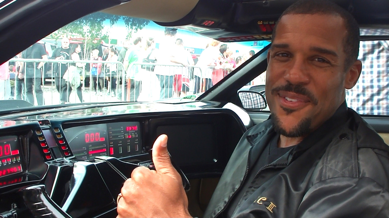 Schauspieler Peter Parros bei der KnightCon 2012 in Castleford im K.I.T.T.-Replika von myKITT.de